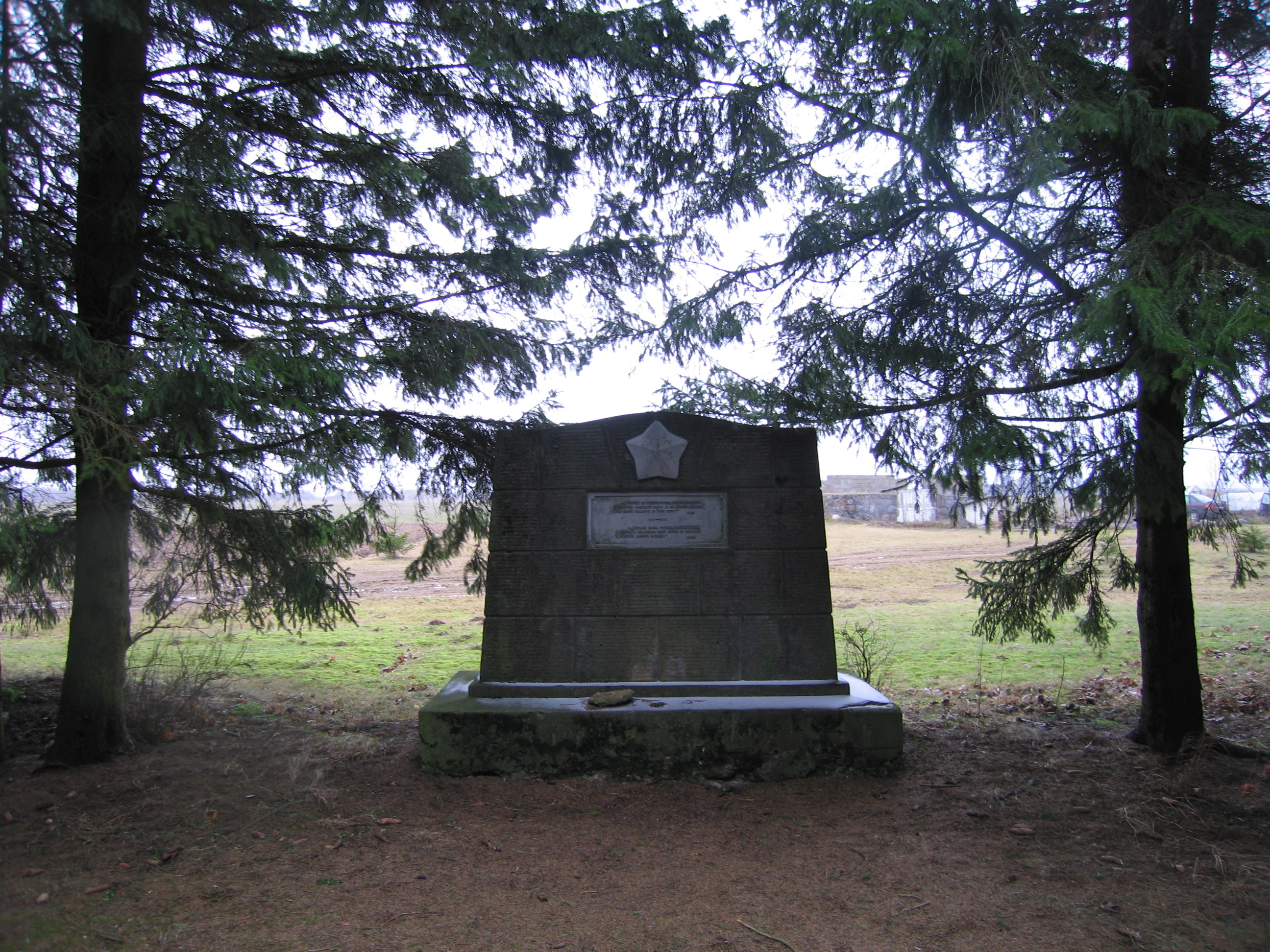 Mälestusmärk matmispaigal